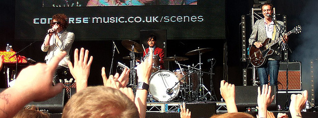 Фото группы Mystery Jets